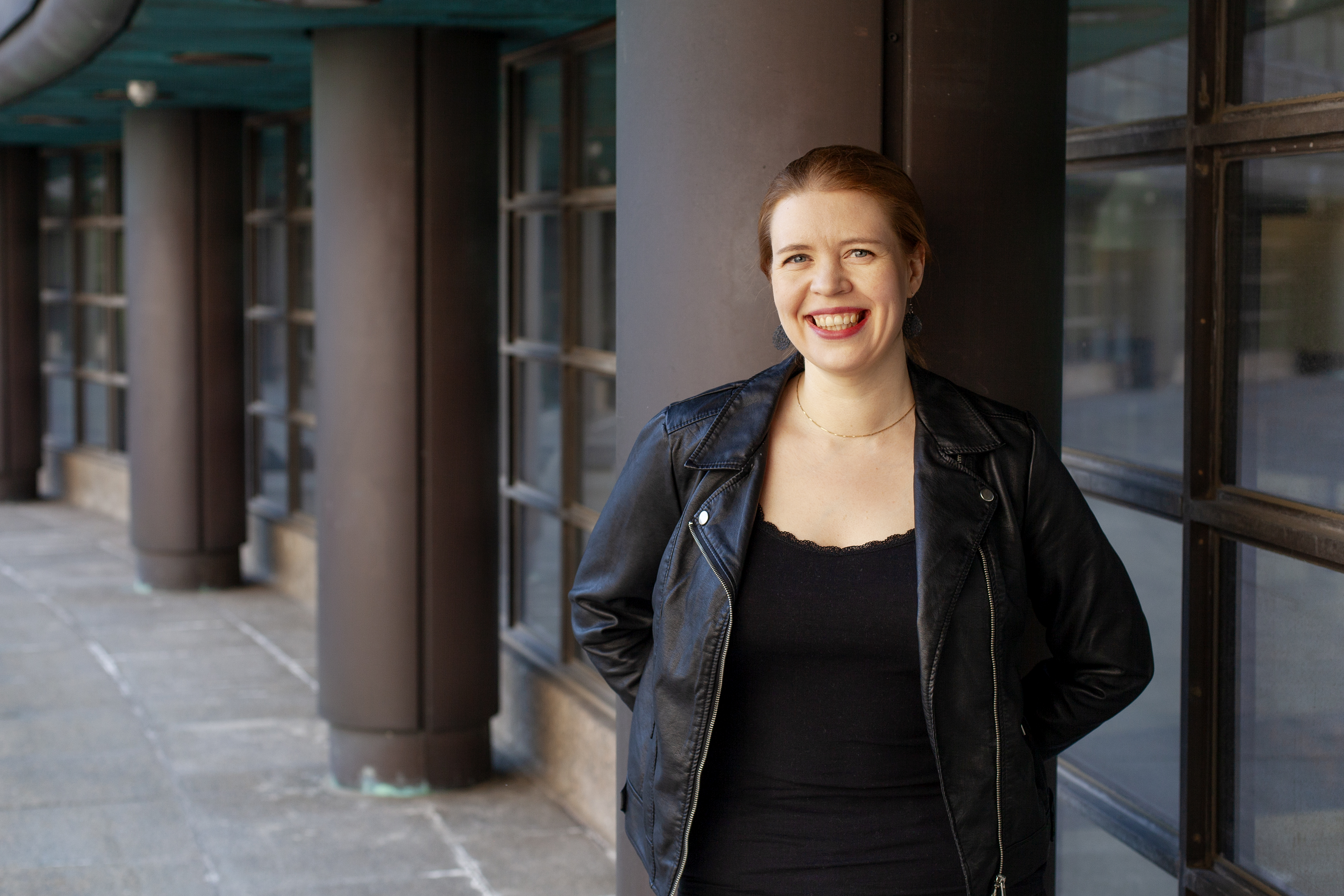 Anna Kontula, eduskunta